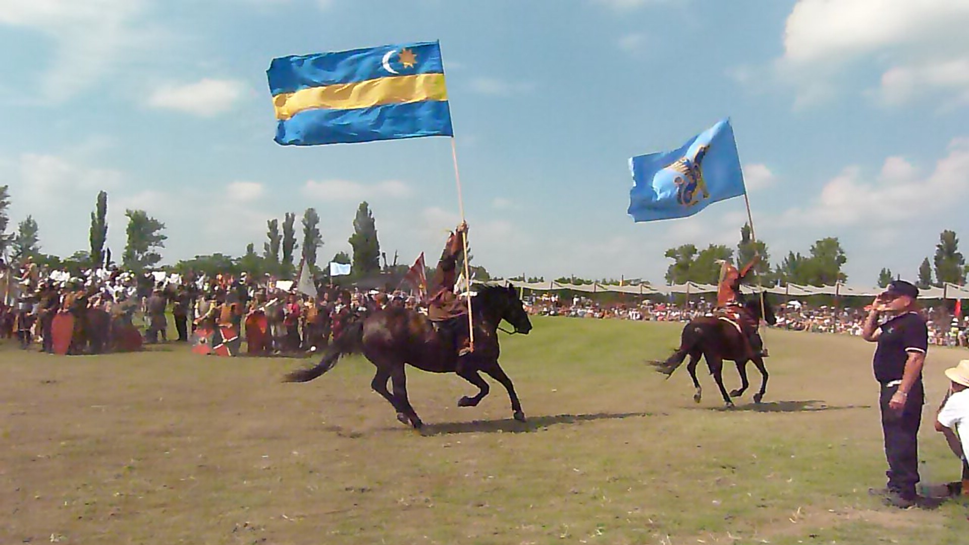 A felvétel 2014. augusztus 9-én, szombaton készült Bugacon. Kurultáj - Magyar Törzsi Gyűlés. 2006 szeptemberében Bíró András Zsolt antropológus, humánbiológus vezetésével öt fős kazak-magyar kutatócsoport több mint egy hónapos expedíció keretében járta be az észak-kazahsztáni Torgaj-vidék területét (Kosztunaj-tartomány, Dzsangeldi-megye), és a kutatás genetikai kapcsolatot mutatott ki a mai magyarság és az említett területen élő madjar törzs (ejtsd: magyar, más néven „torgaji magyarok”) között. Az eredményekről az American Journal of Physical Anthropology tudományos szakfolyóirat is beszámolt. 2006 decemberében a madjarok vezetői Bíró Andrást is meghívták első közös megbeszélésükre Kazahsztánba, ahol úgy döntöttek, hogy létrehoznak egy alapítványt és a következő évben összehívják a Kurultájt, a madjarok törzsi gyűlését. Címkék: Eurasian puszta Puszta Puszta öv Puszta belt Bíró András Zsolt Torgaj Dzsangeli megye Kurultáj Magyar Törzsi Gyűlés 2014-08-09 Magyarok Világszövetsége Magyar-Turán Alapítvány Turán népei Lezsák Sándor (2010: Bugac), (2014: Bugac) Források: Nagy-Kurultáj ©© Derzsi Elekes Andor, Budapest, 2014, You are authorised to use these photos and vids under Creative Commons – even for commercial, for profit purposes. Photos must be attributed to Derzsi Elekes Andor. All of the photos and vids in the Metapolisz DVD line are under Creative Commons and can be used even for commercial – for profit – purposes. Recommended Citation Derzsi Elekes Andor: Metapolisz DVD line